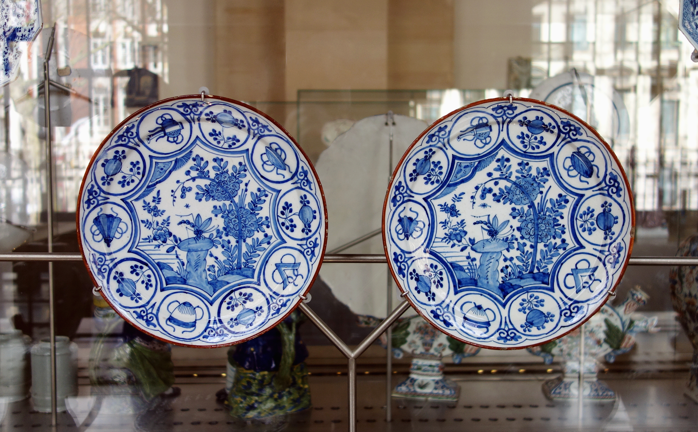 Assiettes, Delft, décor grand feu de camaïeu bleu, au Palais des beaux-arts de Lille.